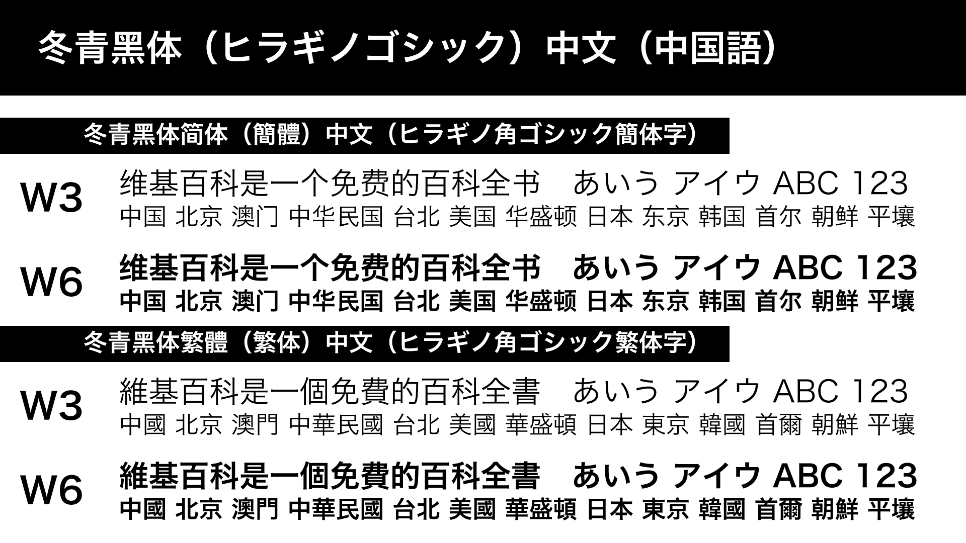 macOSに付属する中国語のヒラギノゴシックを出力したもの。